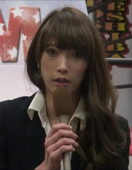 2014年12月2日 12・23後楽園ホール大会記者会見